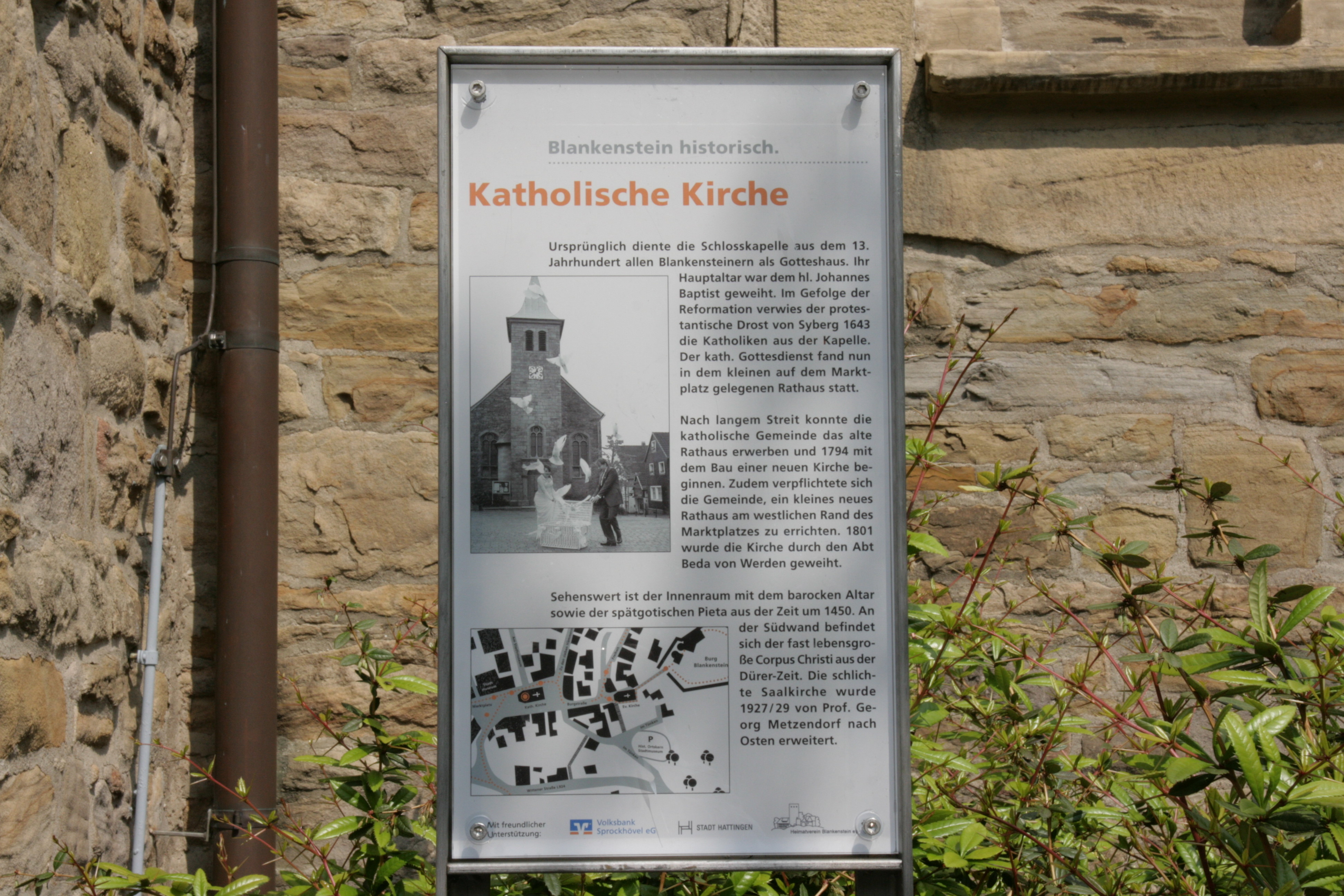 St. Johannes Baptist am Marktplatz in Hattingen-Blankenstein